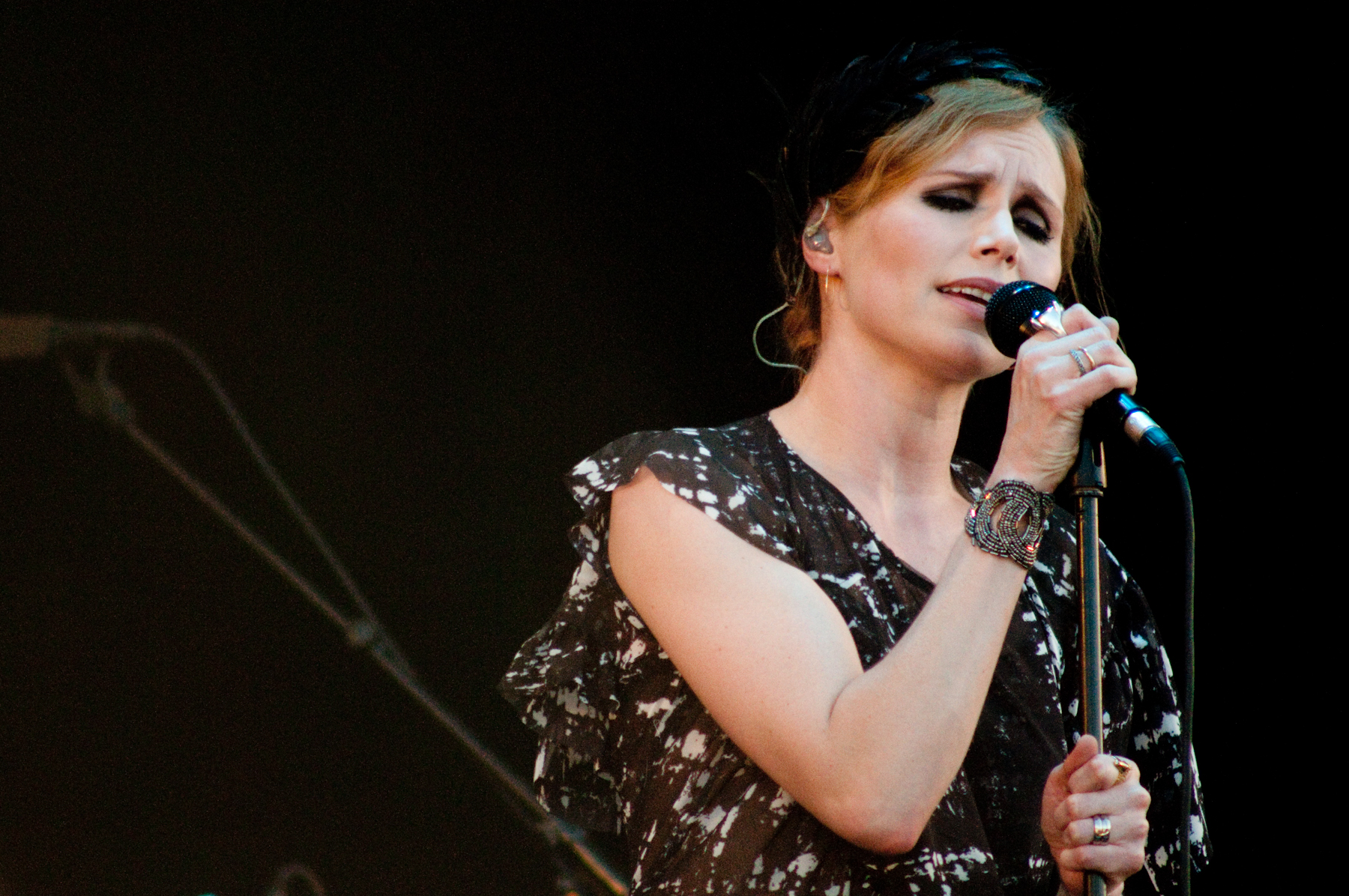 Nina Persson 2009